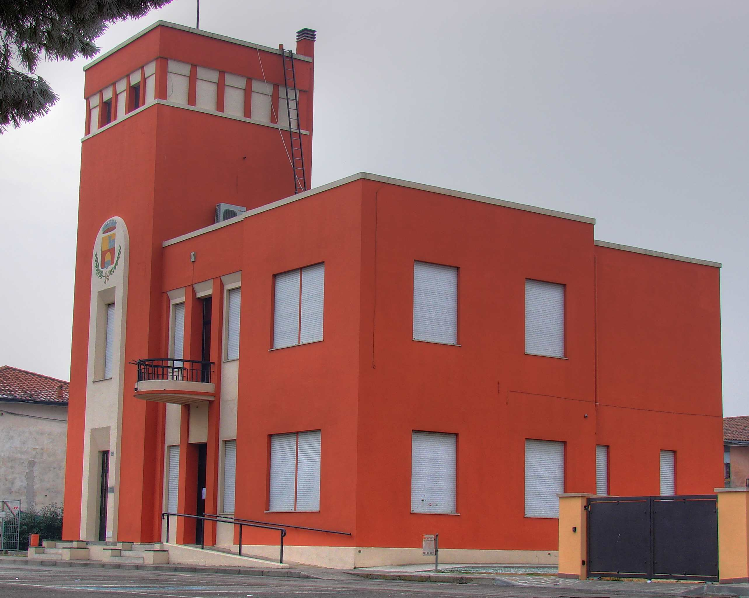 Autore: Mauro Cordioli. Casa comunale di Pontecchio Polesine.